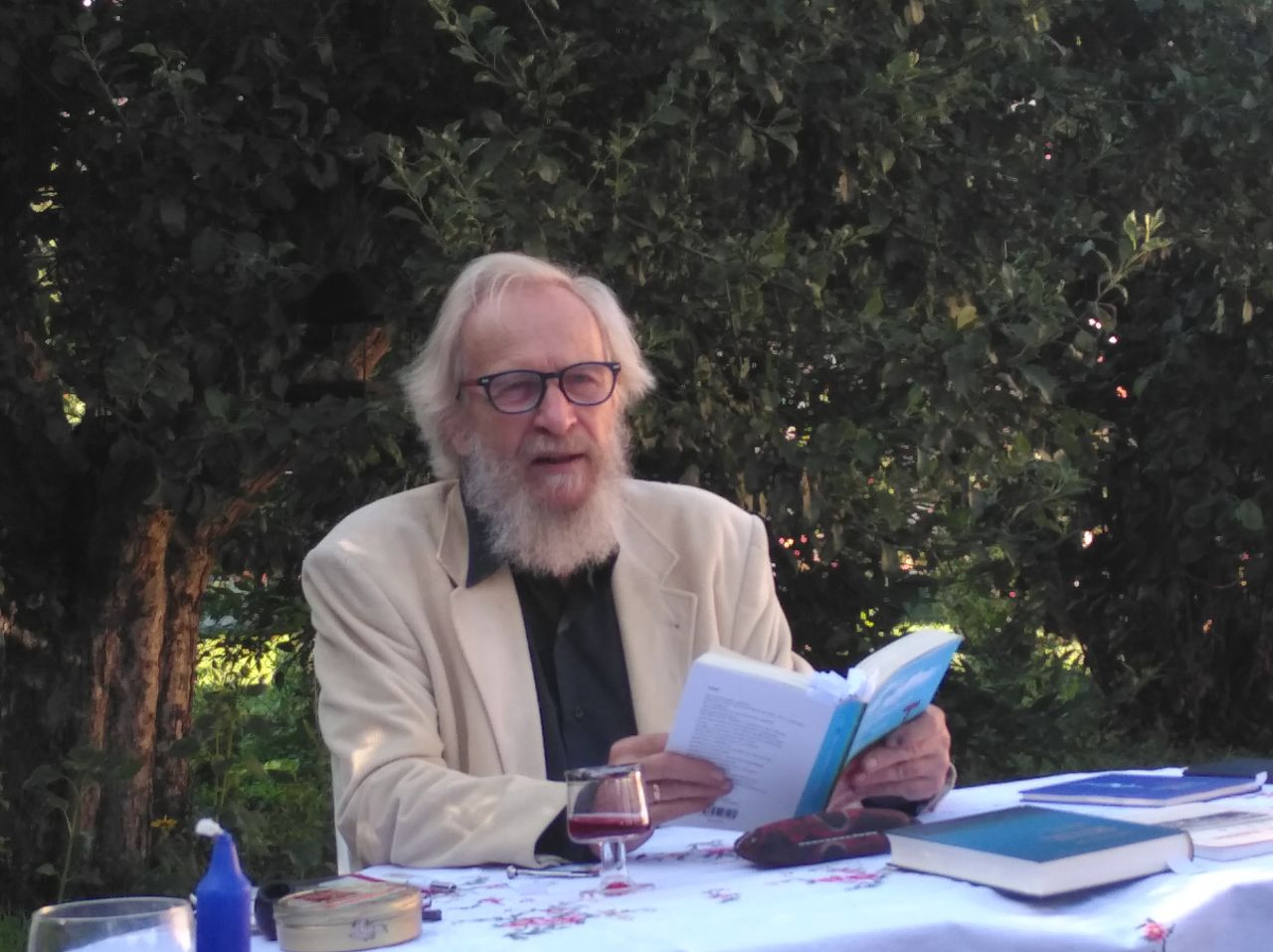 Dr. Godehard Schramm bei einer Lesung im Landkreis Neustadt a.d.Aisch/Bad WindsheimDepicted person: Godehard Schramm – German journalist and translator